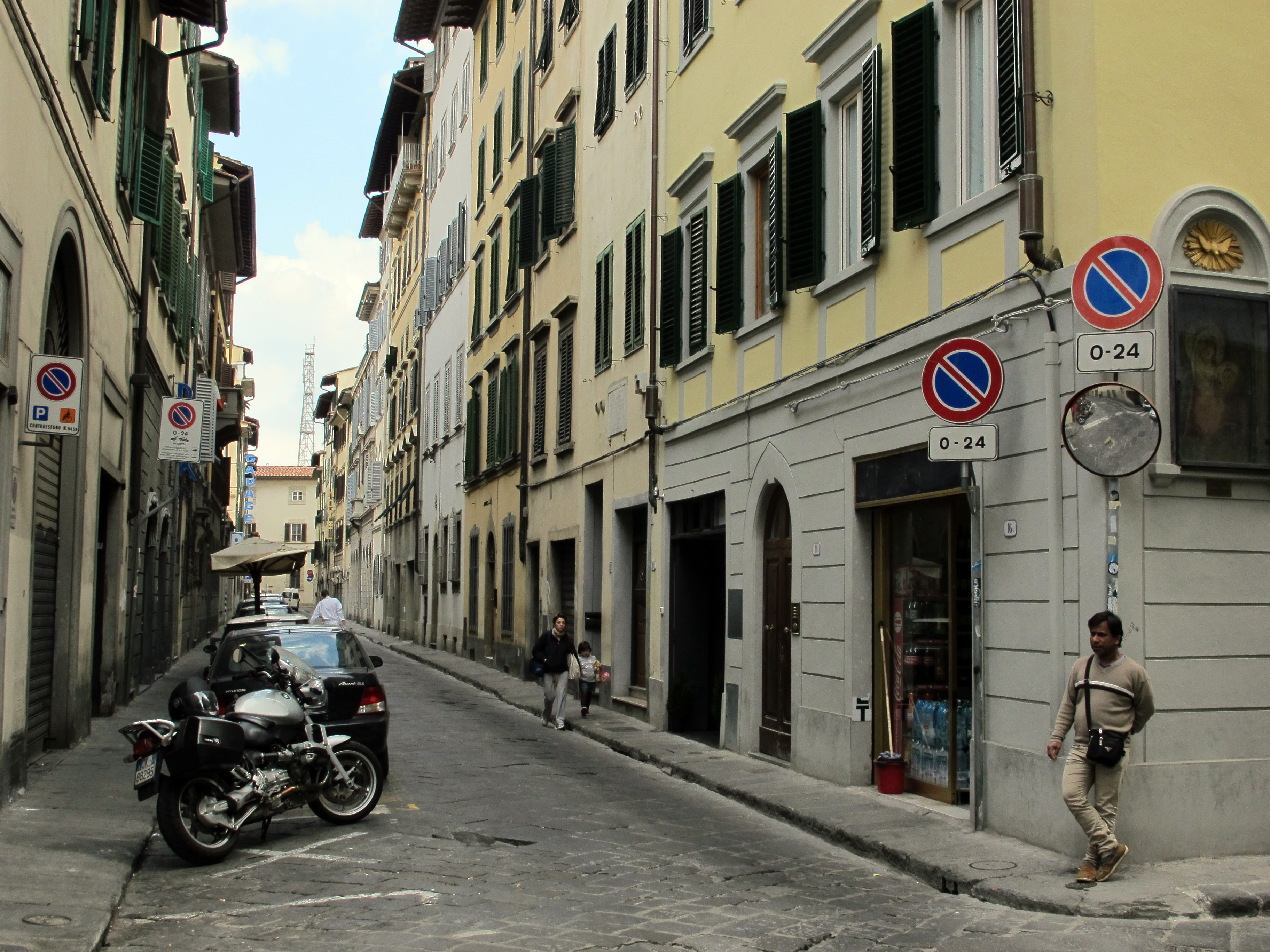 Via fiesolana, veduta